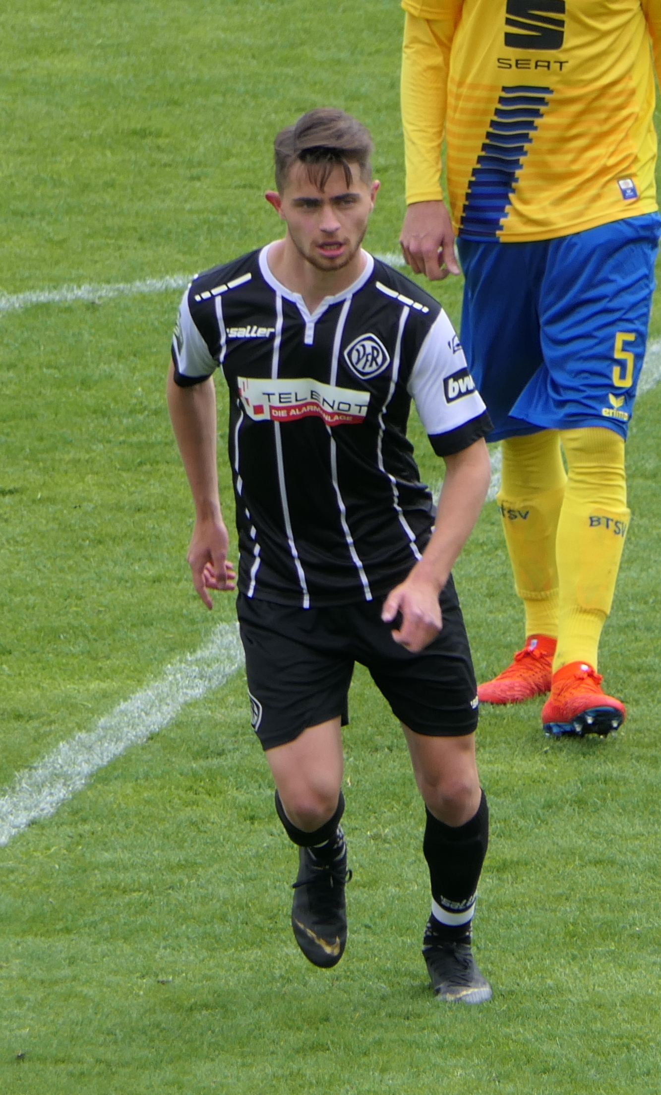 Der Fussballprofi Johannes Bühler im Trikot des VfR Aalen beim Heimspiel gegen Eintracht Braunschweig am 05.05.2019.